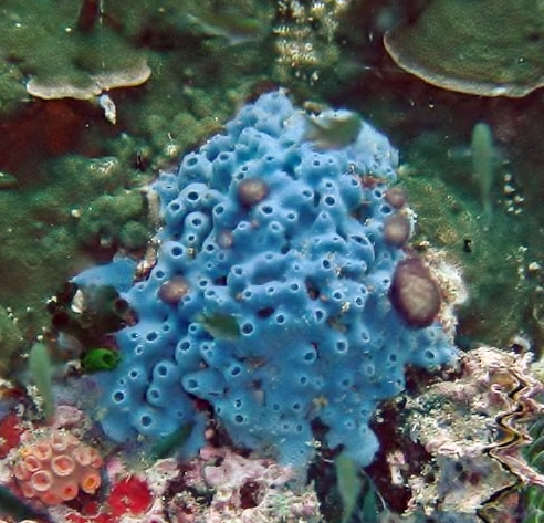 Haliclona sp, en Koh Phangan, Tailandia